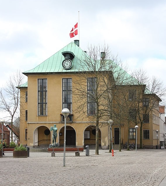 Rathaus von Sonderburg am 18. April 2014